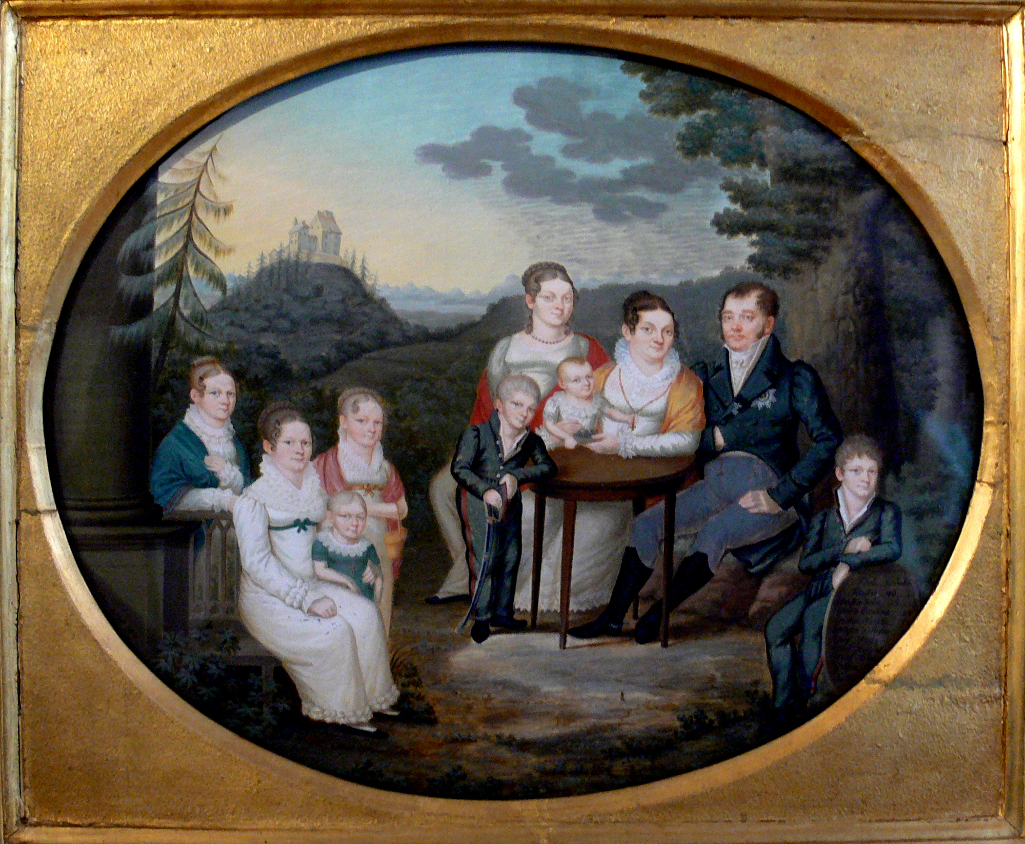 Fürst Joseph Anton zu Waldburg-Wolfegg (1766–1783) mit seiner Familie (Ehefrau: Maria Josepha geb. Fugger zu Babenhausen), im Hintergrund die Waldburg; Gouache auf Papier, 36 x 27 cm, Kunstsammlungen Waldburg-Wolfegg